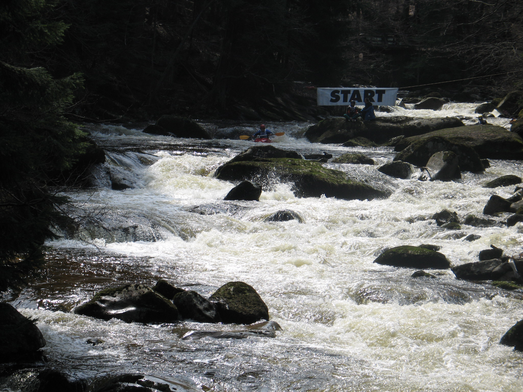 AMP Kamienna 2006 - początek I etapu